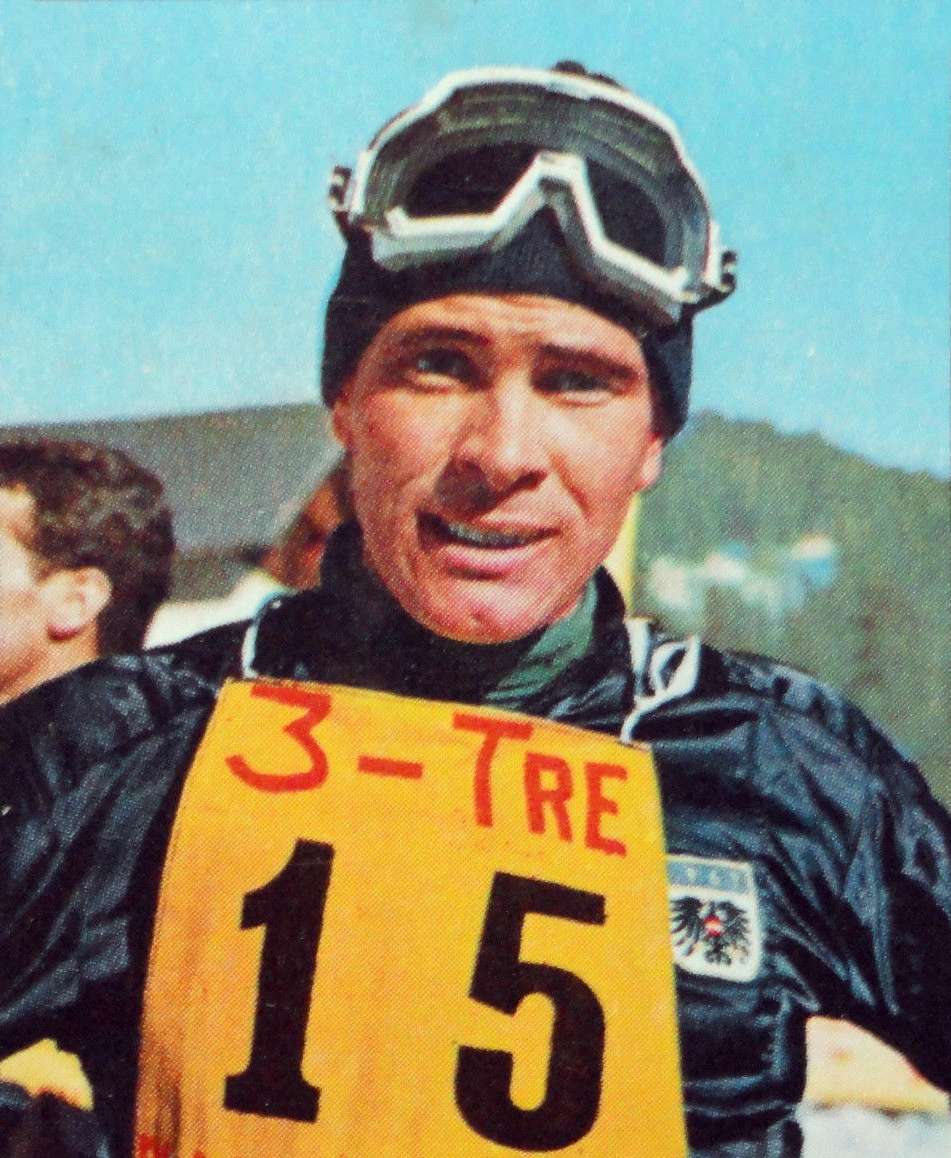 CAMPIONI DELLO SPORT 1968/69 - n. 347 - H. MESSNER -AUT